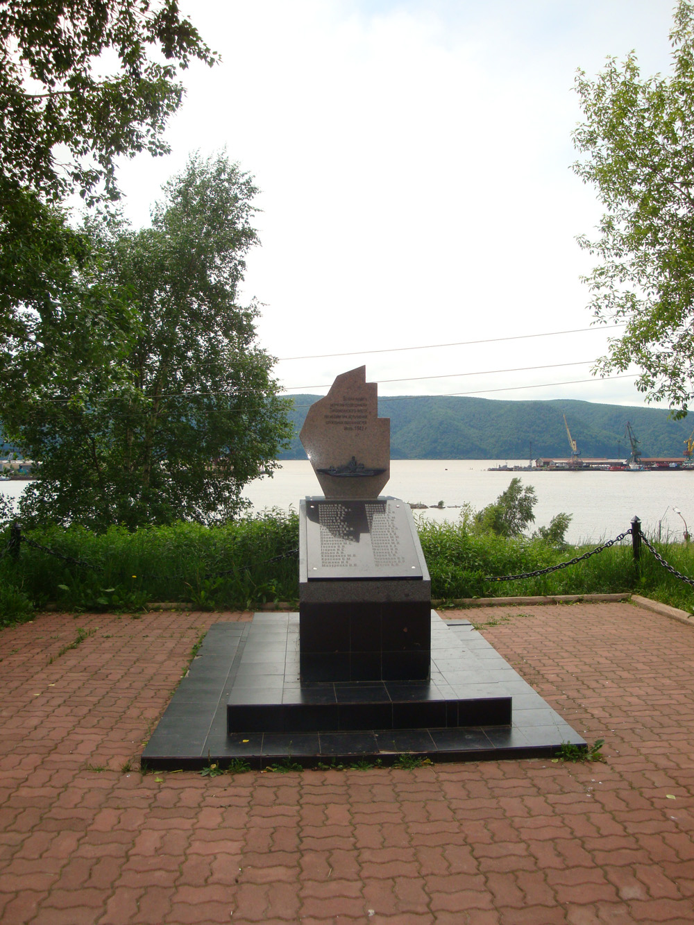 Памятник моряков-подводников, погибших при исполнении служебного долга в 1942 г